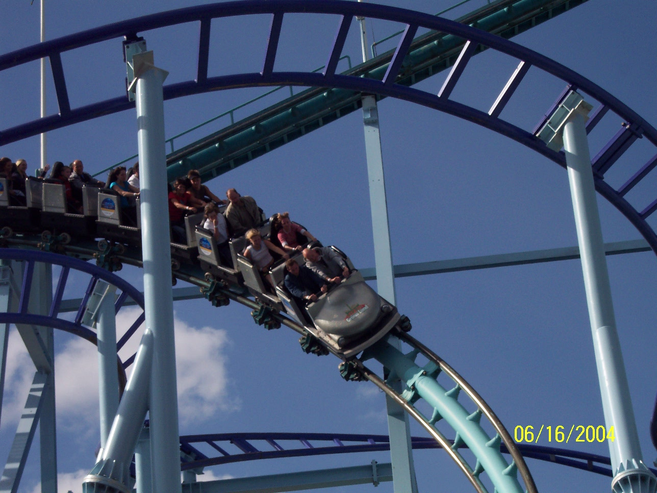 Berg-og-dal banen Jetline fra Gröna Lund i Sverige. Bilde tatt av Bruker:ThorRune.